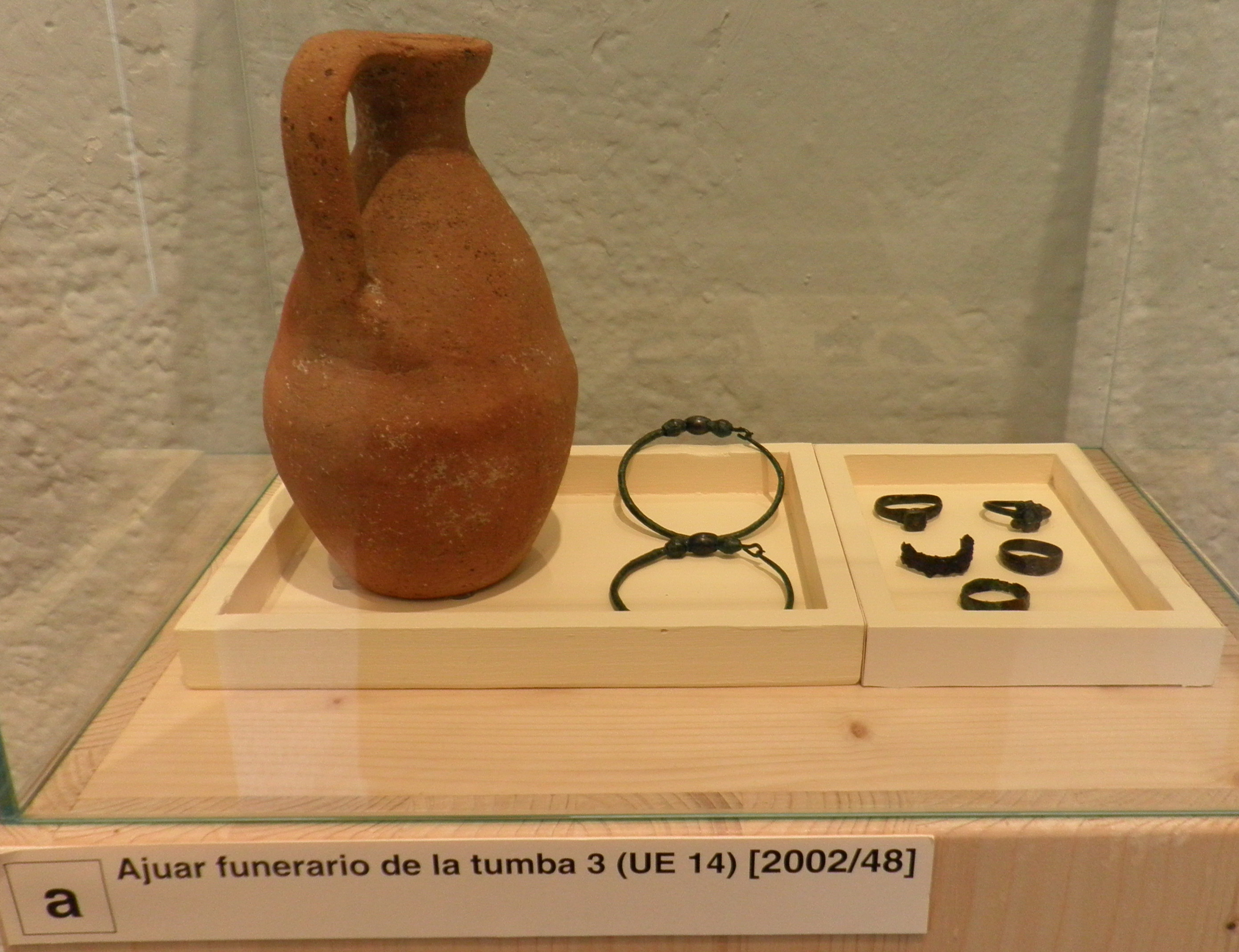 Ajuares funerarios procedentes de las excavaciones en las necrópolis visigoda y altomedieval